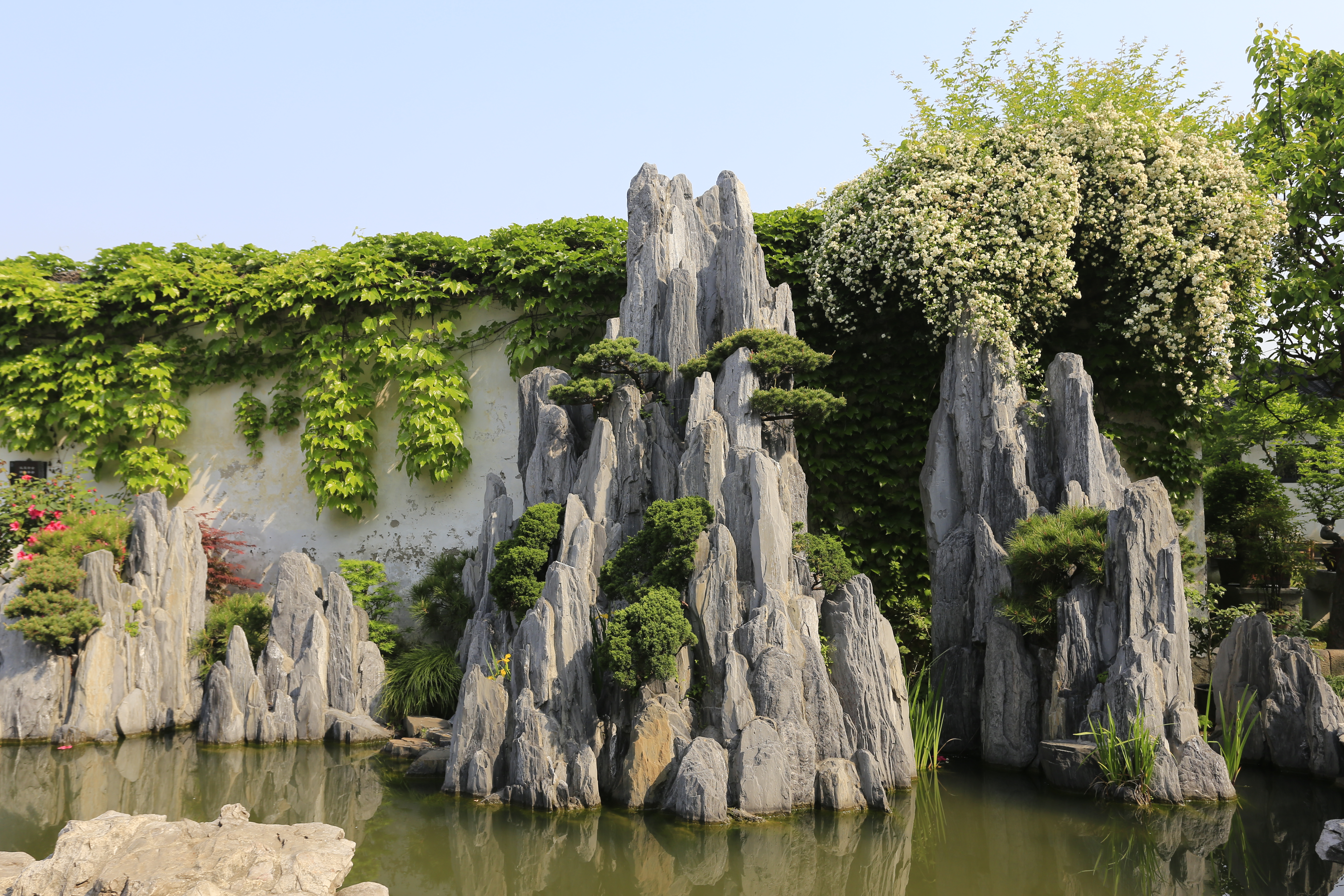 苏州留园—— 盆景园